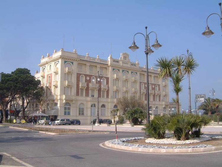 Je suis l'auteur de cette photo réalisée à Cesenatico en avril 2007